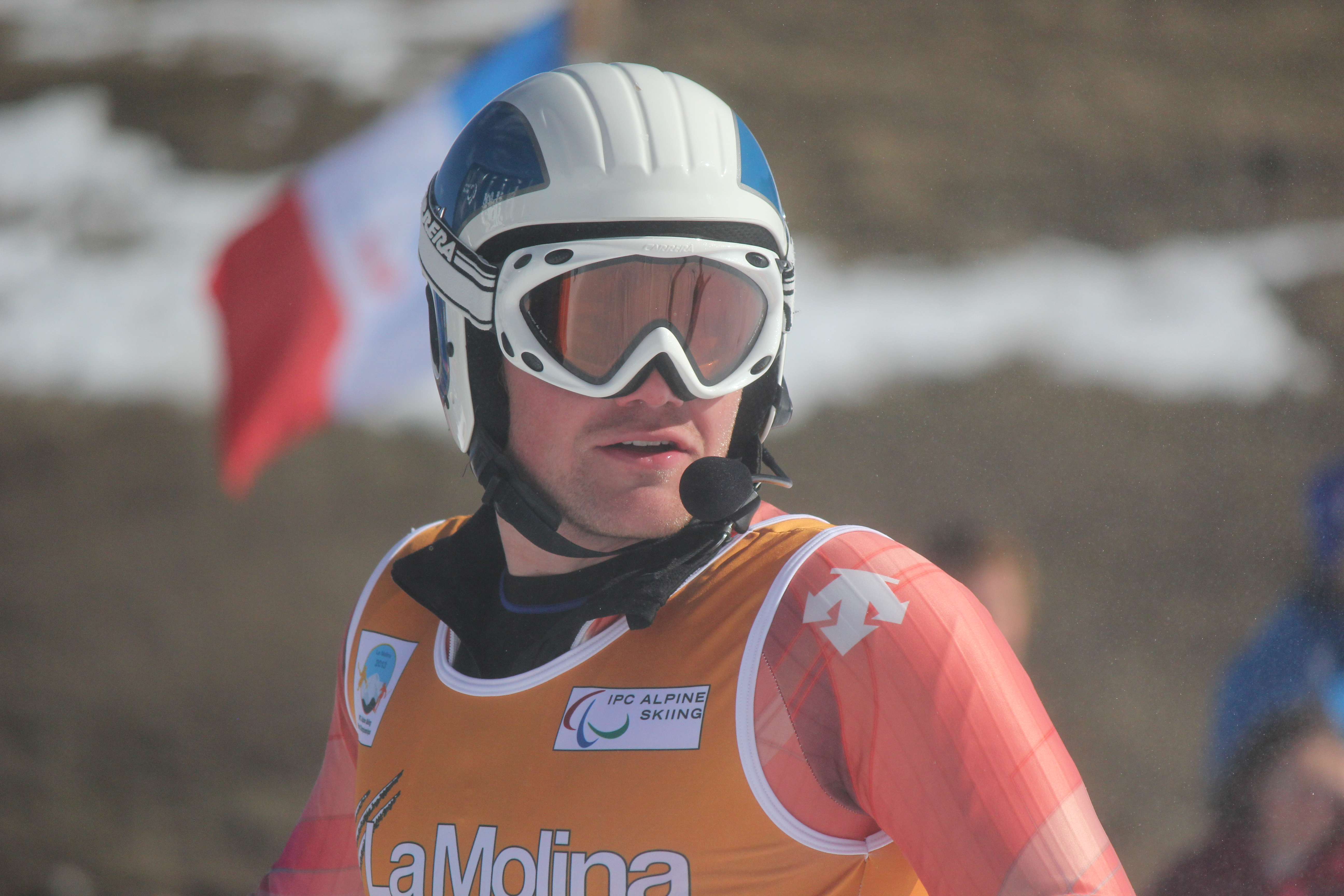 Arnau Ferrer, guía de Gabriel Gorce. Campeonato del Mundo IPC de Esquí Alpino. 2013. La Molina, España.